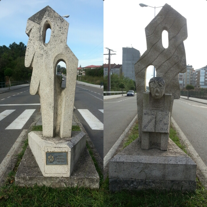 Este monumento conmemorativo de Avelina Valladares atópase na Rúa da Cultura da Estrada, Pontevedra.